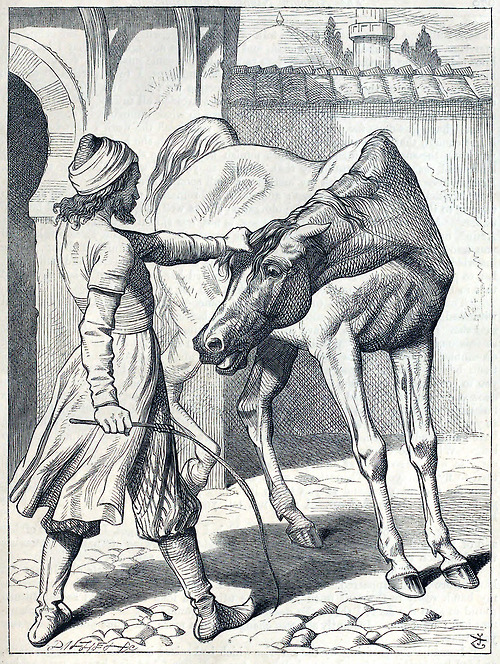 Sidi Nouman's vengeance on his wife. From the Arabian Nights